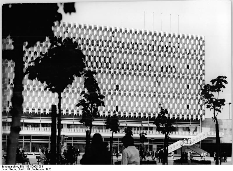 Berlin, Alexanderplatz, "Centrum"-Warenhaus ADN-ZB Sturm 28.9.71 Berlin: Die modern gestaltete Fassade des Centrum-Warenhauses am Berliner Alexanderplatz reizt jeden Fotografen. Immer wieder suchen sie nach neuen Standpunkten und Blickwinkeln.